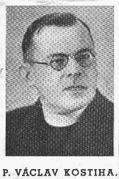 Václav Kostiha (1900 - 1942), Český římskokatolický kněz.